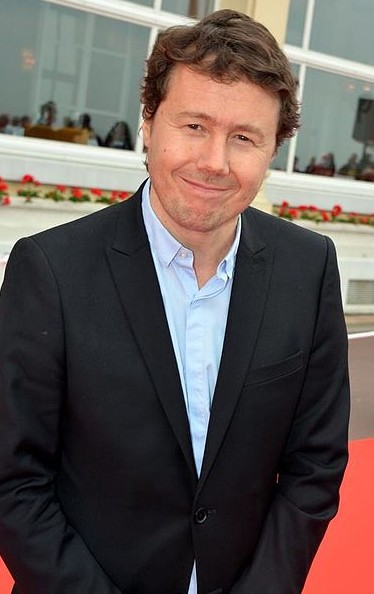 Ivan Calbérac au festival de Cabourg